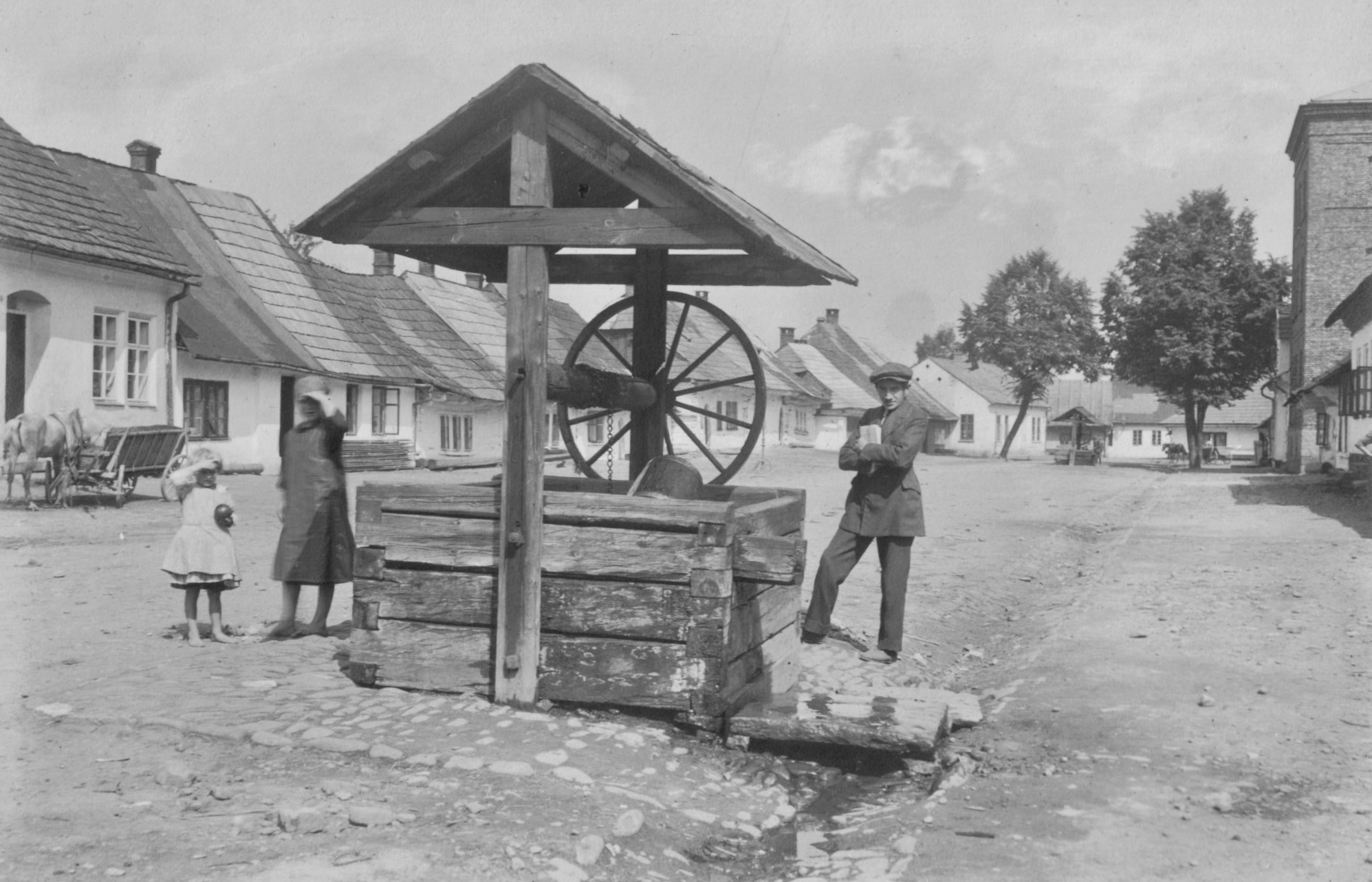 studnia, Rudza w Żywcu, ok. 1920